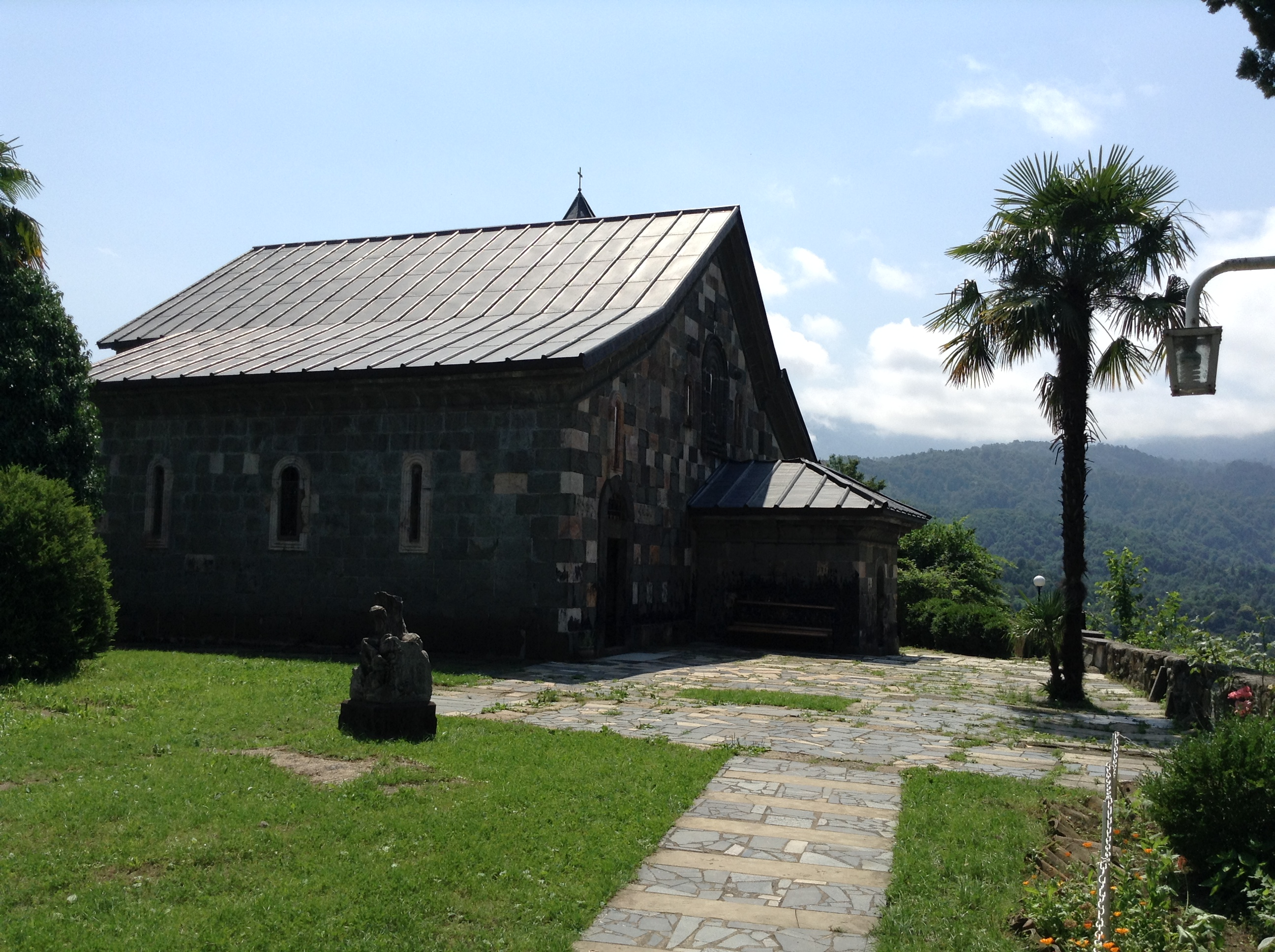 ეკლესია ღვთაებისა